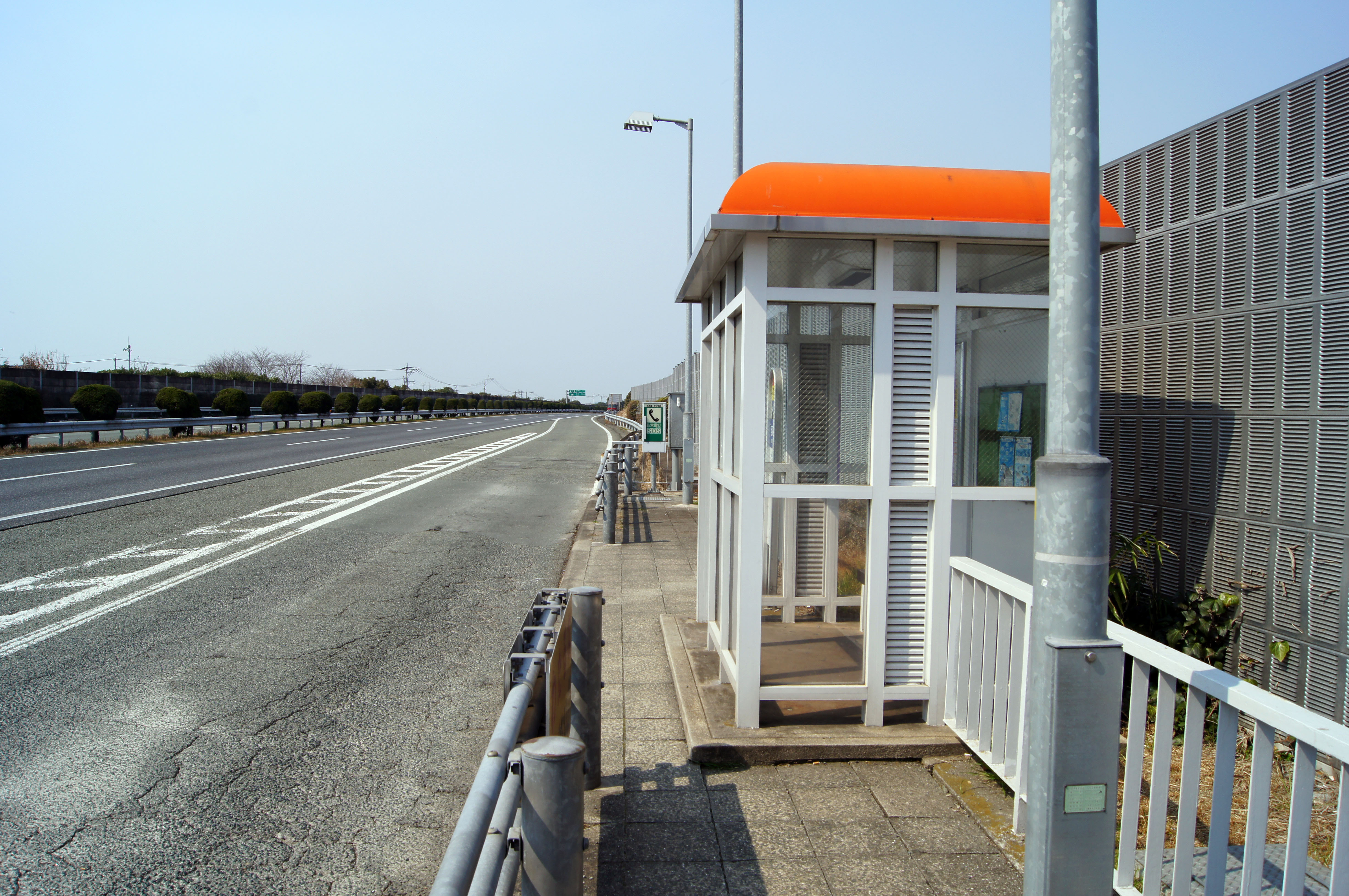 九州自動車道 西合志バス停留所 下り（宮崎・鹿児島方面）